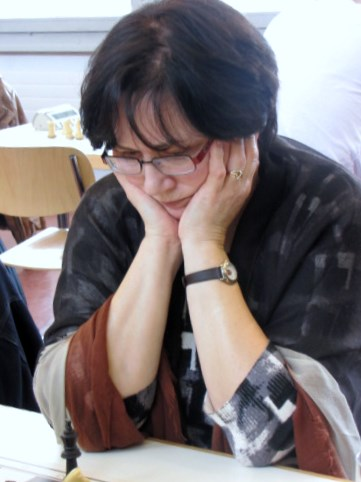 Tamara Vilerte, 2013 in Ragaz / Schweiz